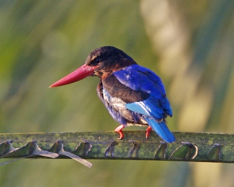 Javan Kingfisher Halcyon cyanoventris Ubud, Bali, Indonesia 28th. September 2008 Local name: Cekakak gunung, Raja udang biru Jawa Cistribution: 690V3323